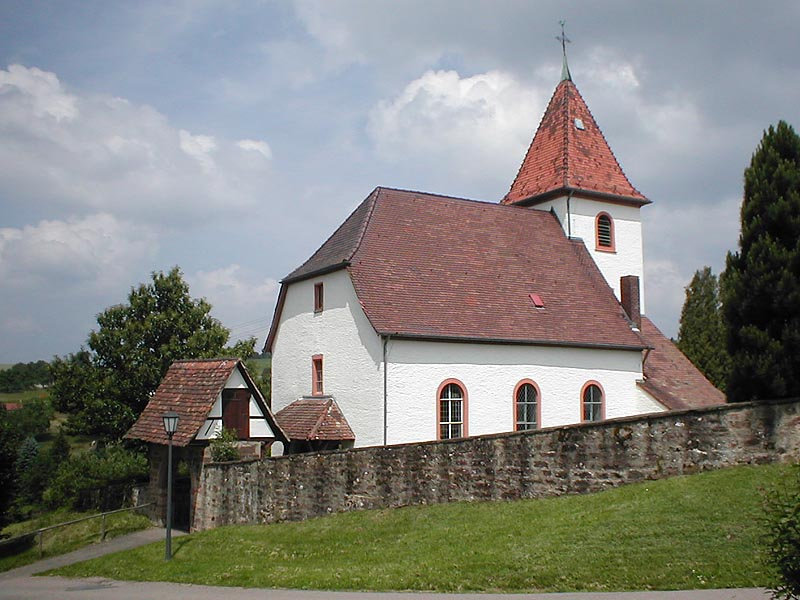 Kirche in Schönbrunn-Haag, erbaut 1740-51